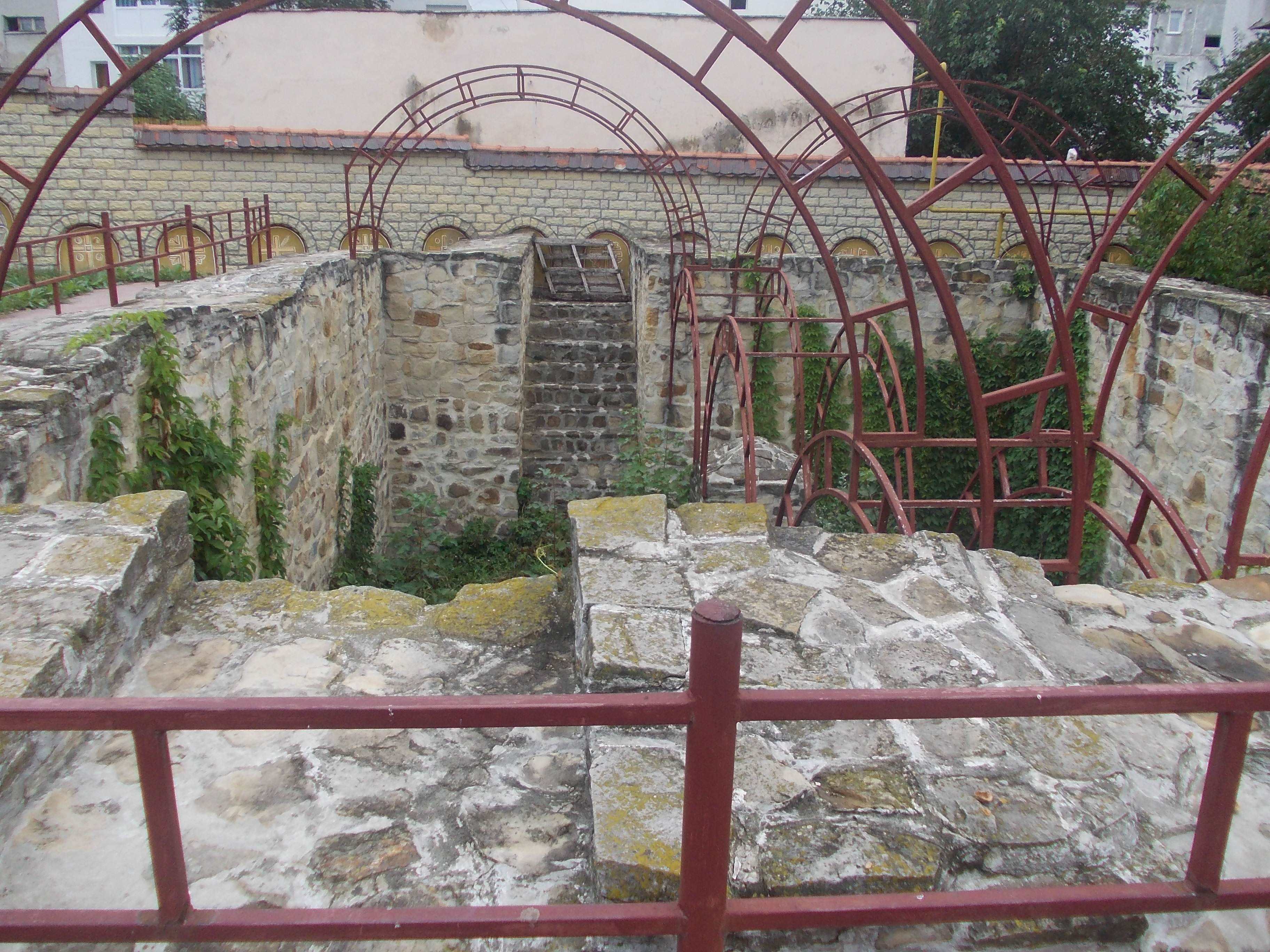 Ruine turn 03